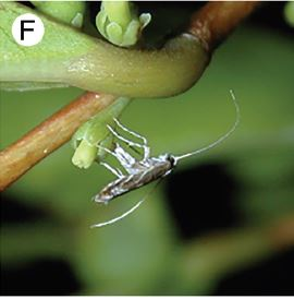 Epicephala obovatella